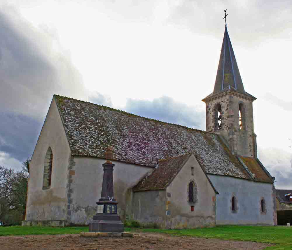 Eglise de Saint-Palais